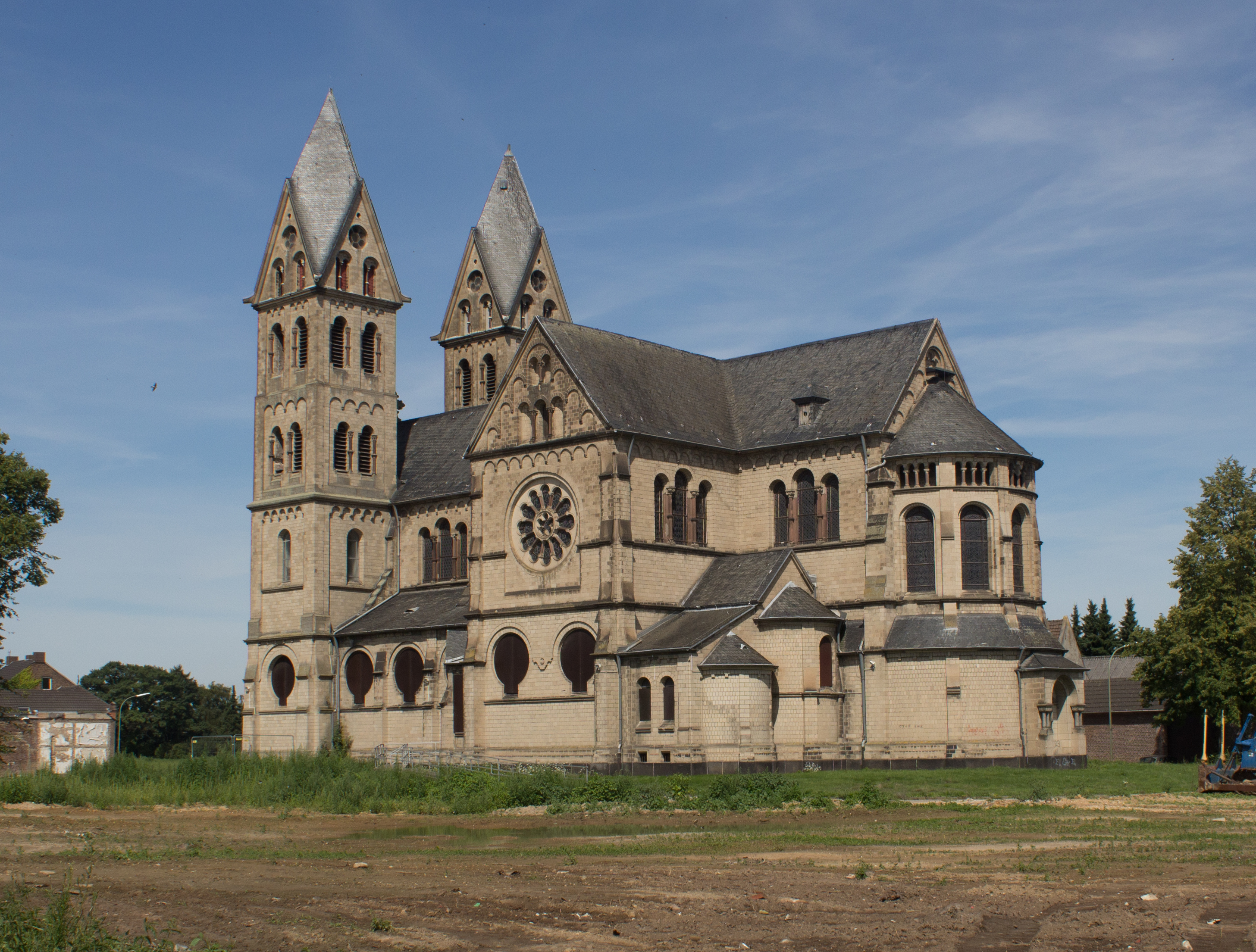 Die ehemalige römisch-katholische Kirche St. Lambertus im ImmerathThis is a photograph of an architectural monument., no. 157